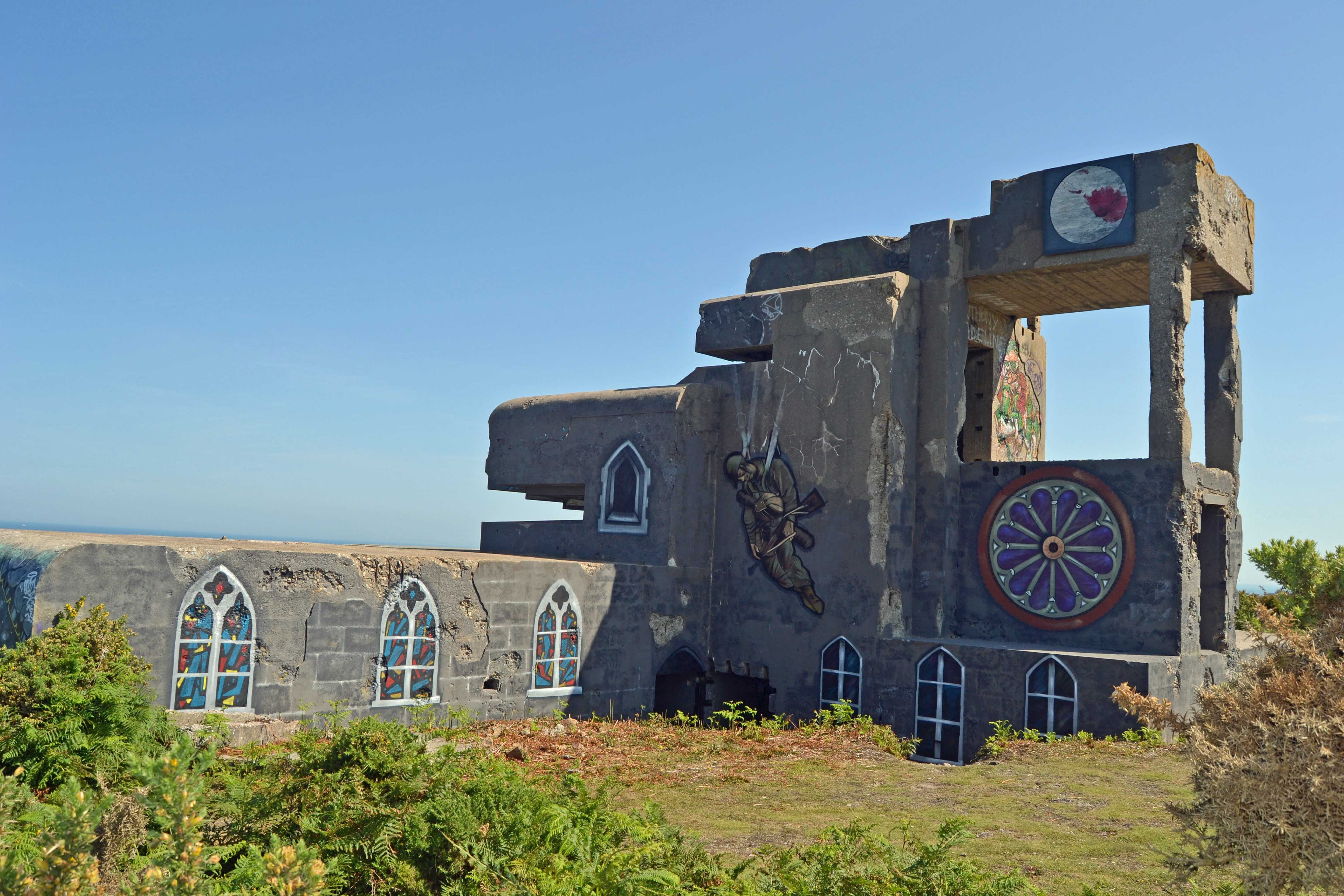 L'observatoire du Bruley à Fermanville, en 2017.